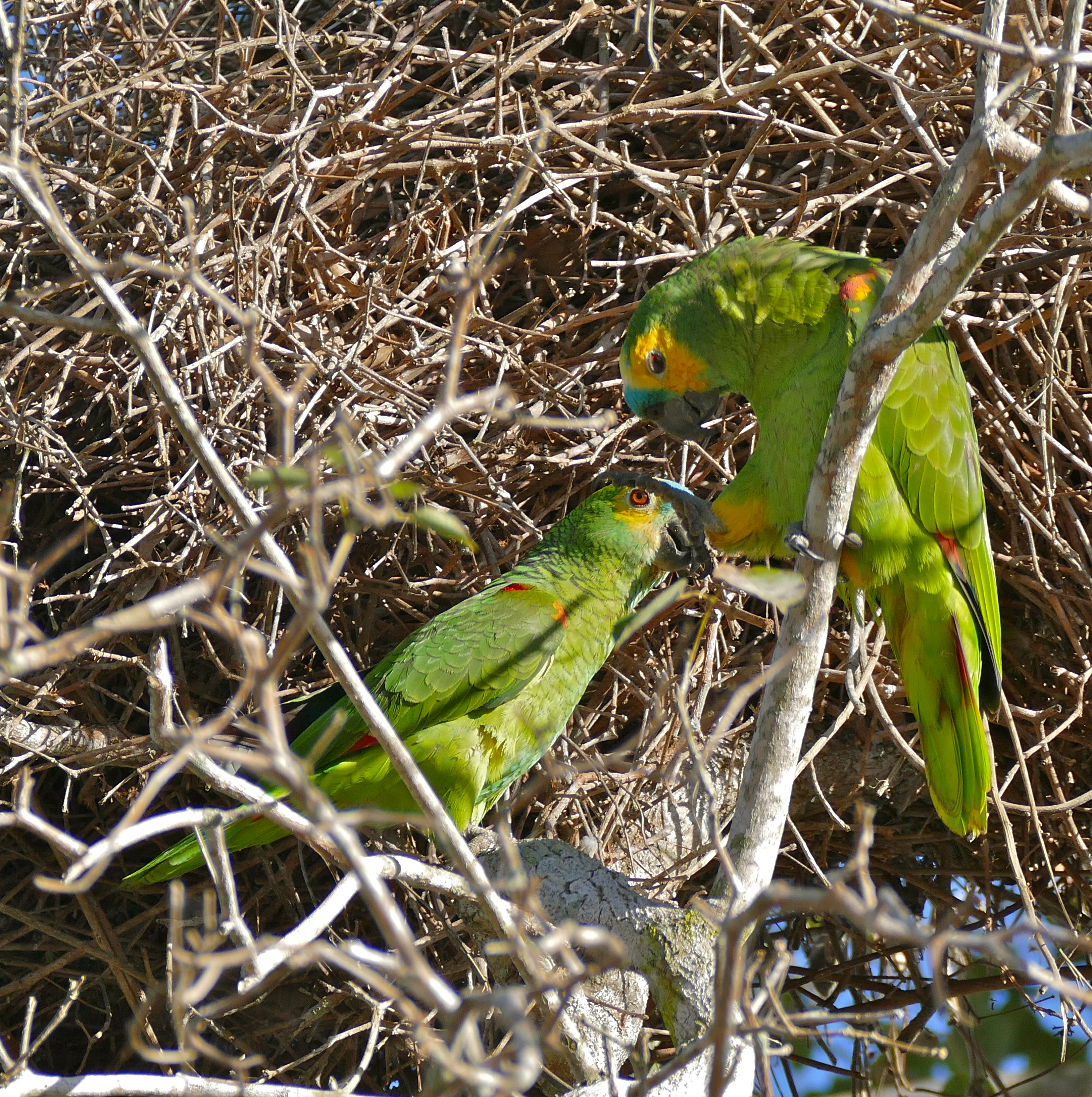 Pouso Alegre, Transpantaneira, Poconé, Mato Grosso, BRAZIL